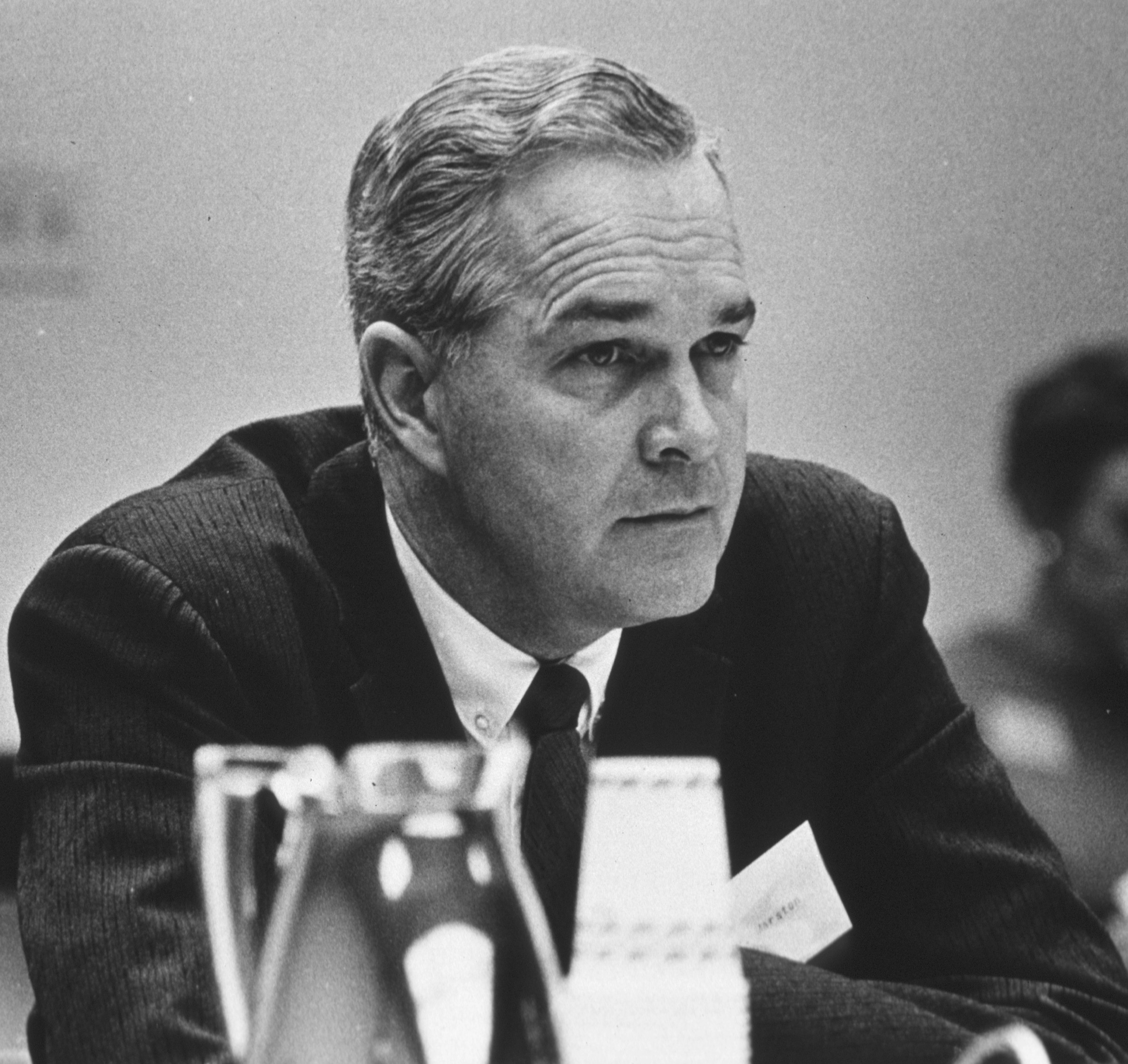 Dr. Robert Q. Marston